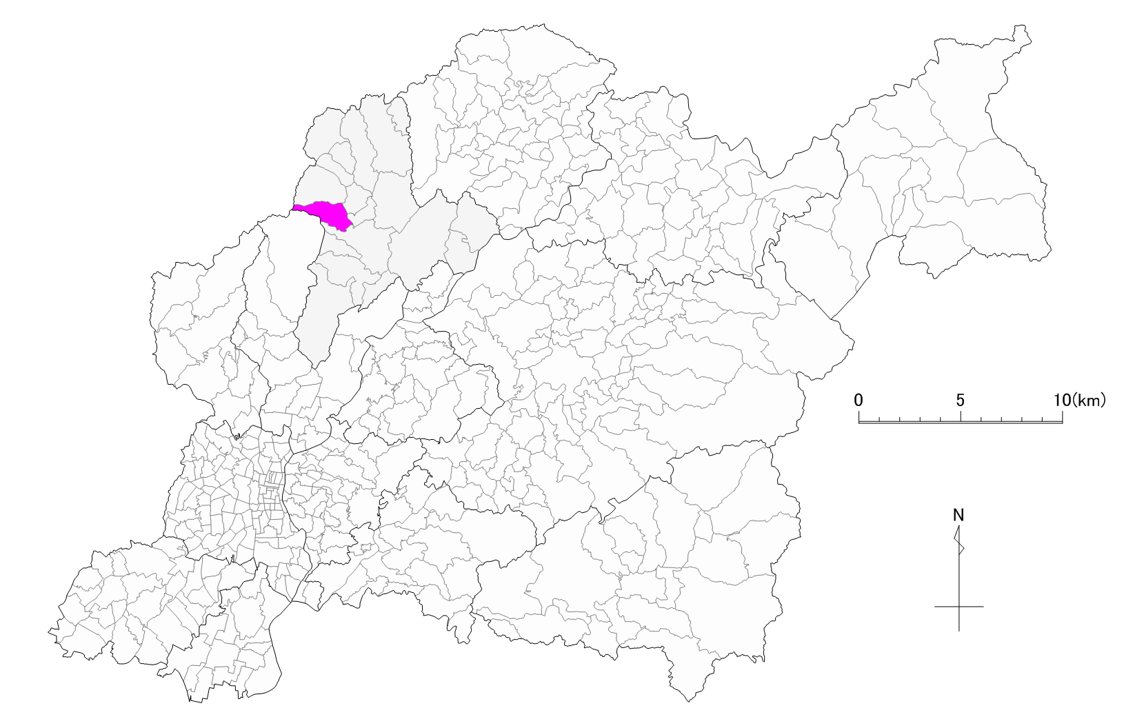 豊田市北一色町位置図